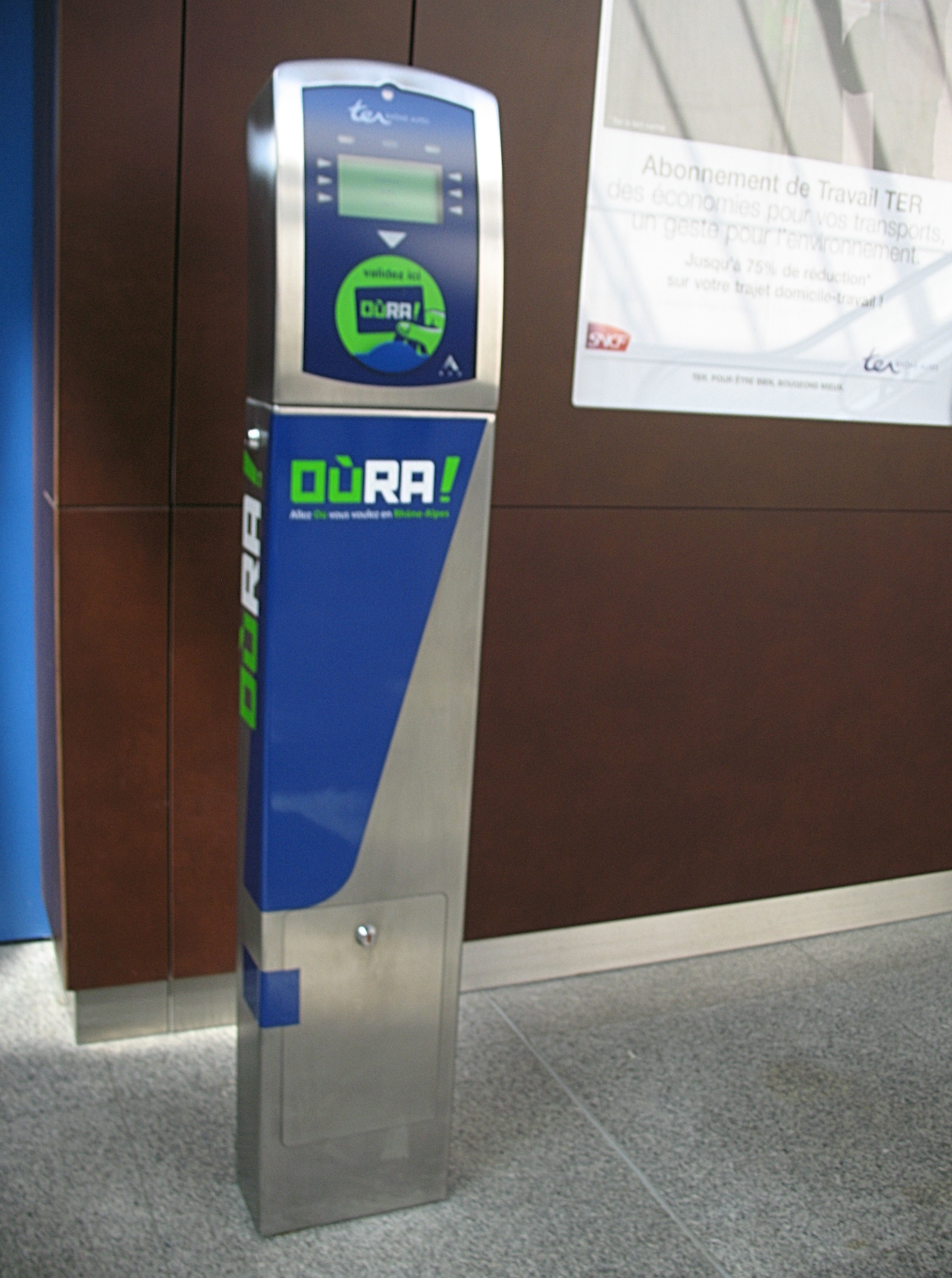 Valideur Carte OùRA valable sur les transports en commun de la région Rhône-Alpes en France.